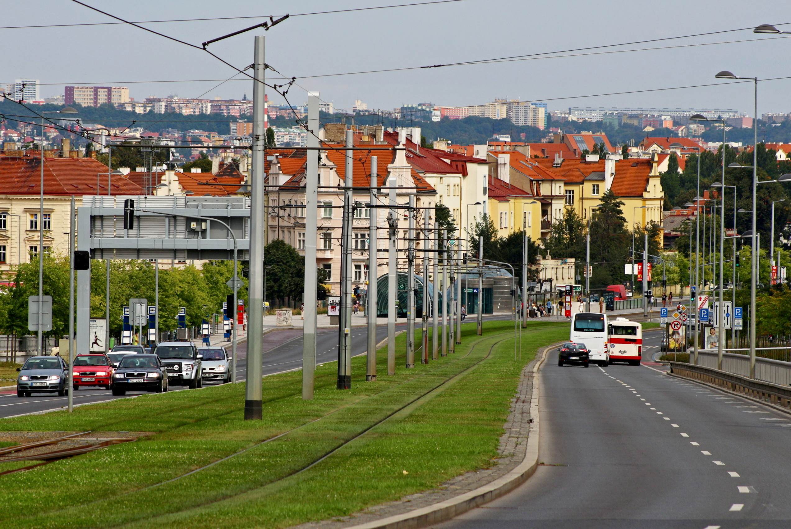 Praha-Hradčany ulice Milady Horákové